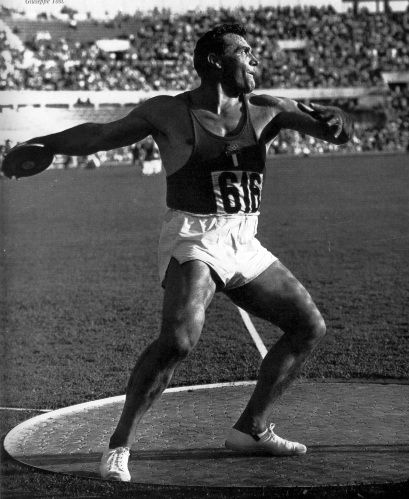 Adolfo Consolini mentre lancia un disco.